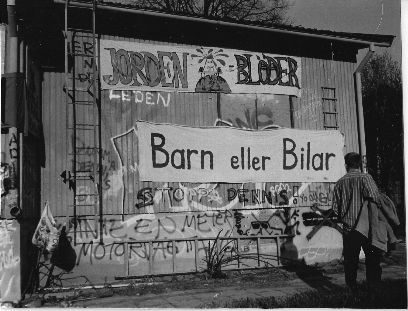 Ockuperat hus vid Häggvik i början av 1990-talet